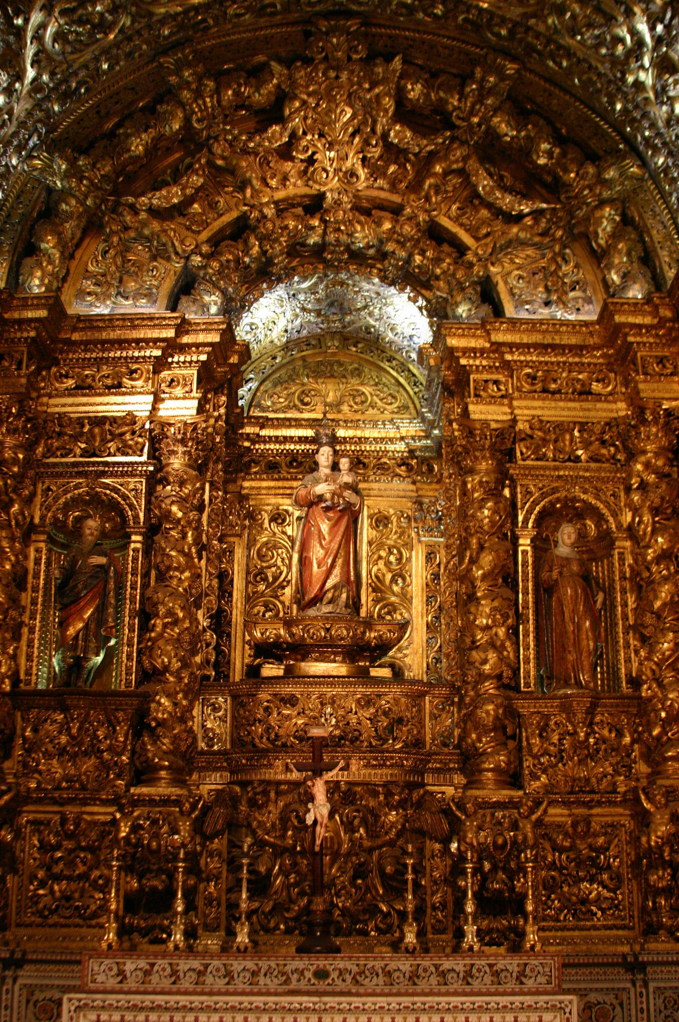 Capela de Nossa Senhora da Doutrina - Igreja de São Roque